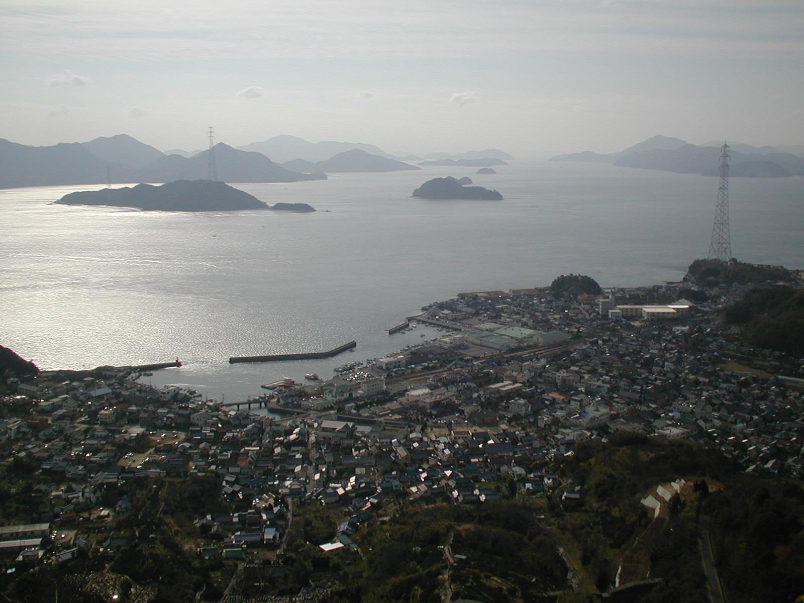 Takehara-Seto